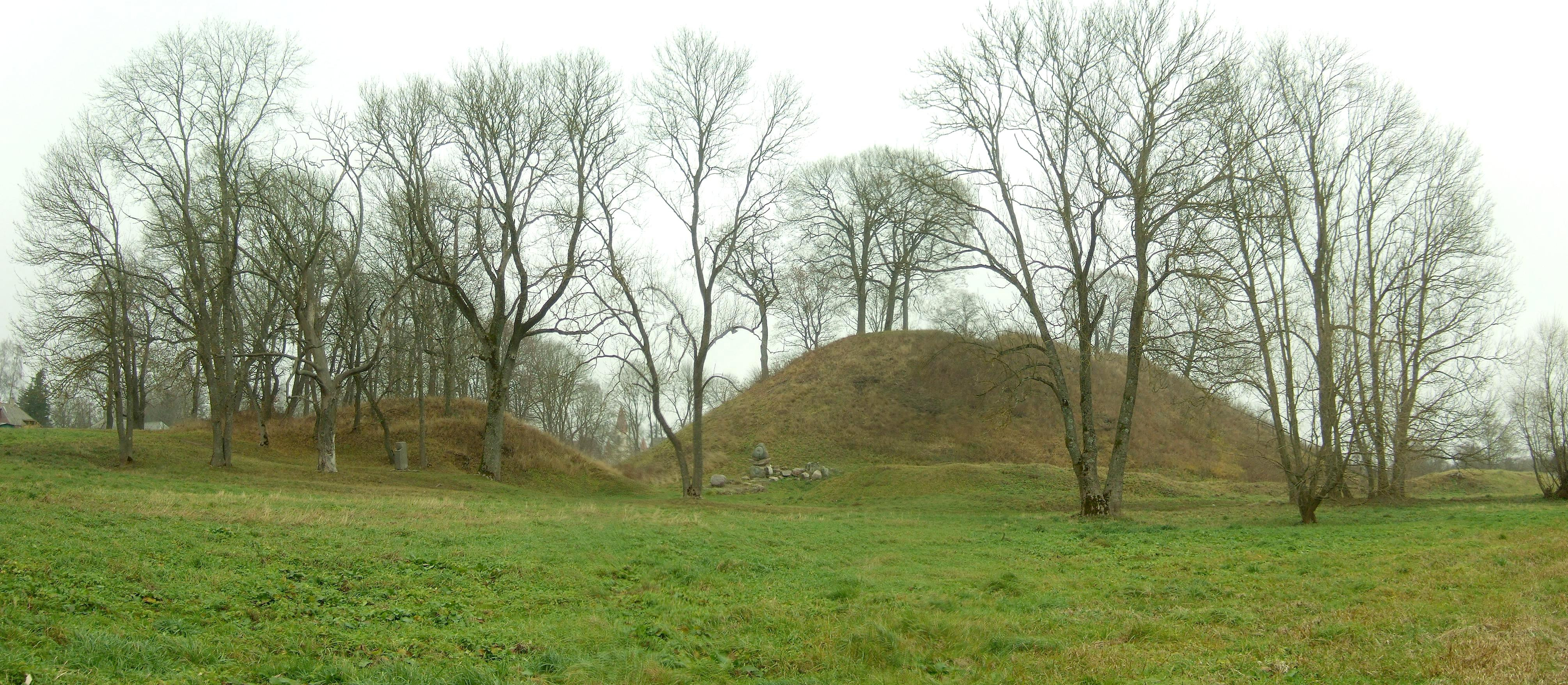 Maišiagalos piliakalnis